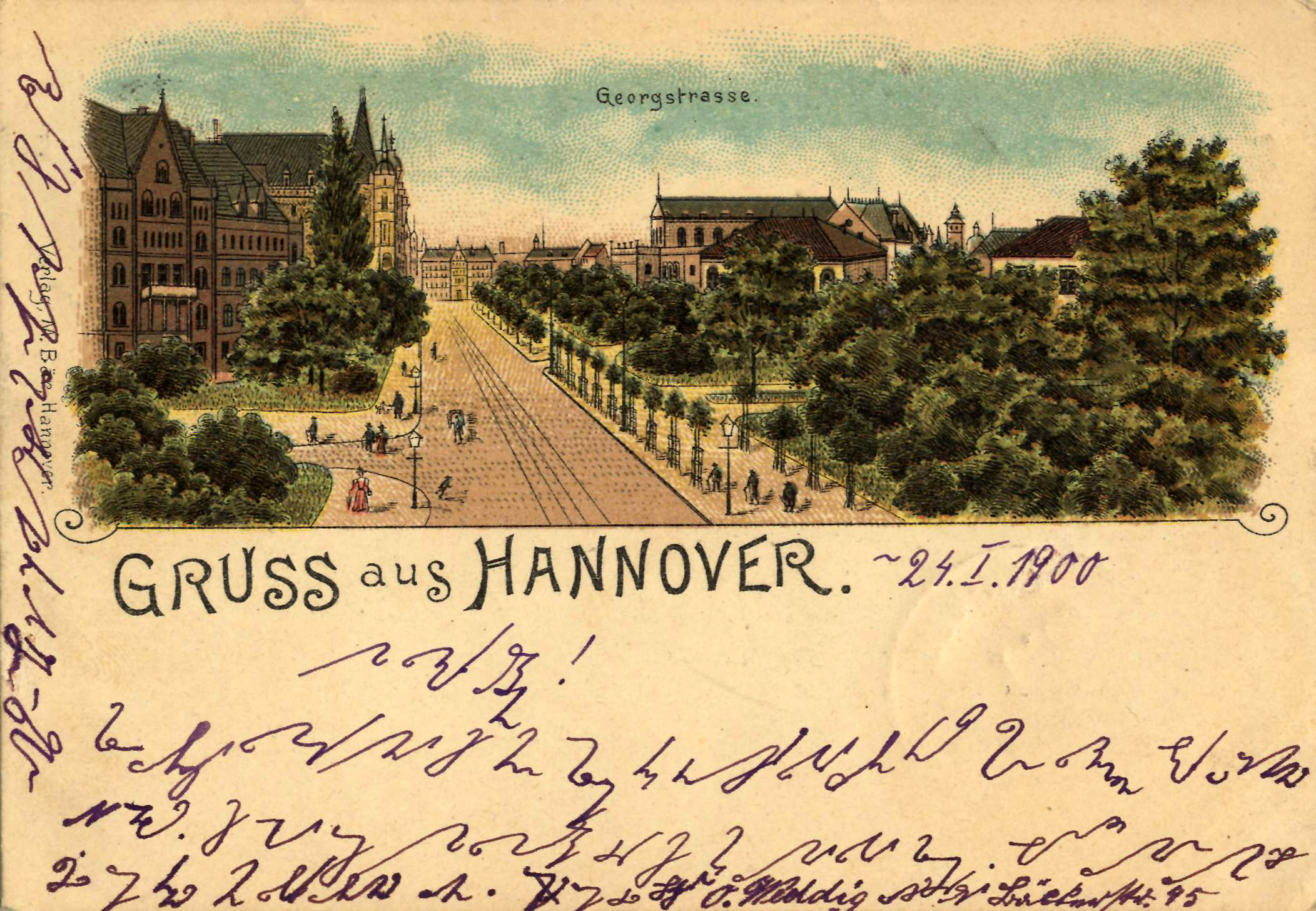 Bildseite einer nicht nummerierten, farbig lithografierten Ansichtskarte (ohne Künstlersignatur) aus dem "Verlag M. Bär" mit dem Vordruck "GRUSS aus HANNOVER". Zu sehen ist der südliche Verlauf der Georgstraße in Hannover mit dem Opernhaus (im Hintergrund rechts), bevor das Gebäude der Hannoverschen Bank bis 1900 am Georgsplatz Ecke An der Börse errichtet wurde. Typischerweise nutzten vor 1905 hergestellte Ansichtskarten nur einen Teil der Fläche der Bildseite, um Raum zu lassen für die vom Absender aufzutragenden Nachrichten. Hier nutzte der Absender die Fläche mit einer platzsparenden Kurzschrift, nämlich Nationalstenographie. Die Nachricht lautet: Den 24. I. 1900 Sehr geehrtes Fräulein! Ihrem Wunsche gemäß sende ich Ihnen hiermit eine Ansichtskarte von unserer lieben königlichen Haupt- und Residenzstadt Hannover. Ich habe mich sehr gefreut, als ich Ihre werte Karte erhielt. Hoffentlich werden wir noch länger miteinander in Korrespondenz stehen. Mit aller Hochachtung O. Weddig Bäckerstraße Bäckerstr. 45 [Seitlich:] Dürfte ich Sie bitten, mir bald wieder ein paar Zeilen zu schreiben